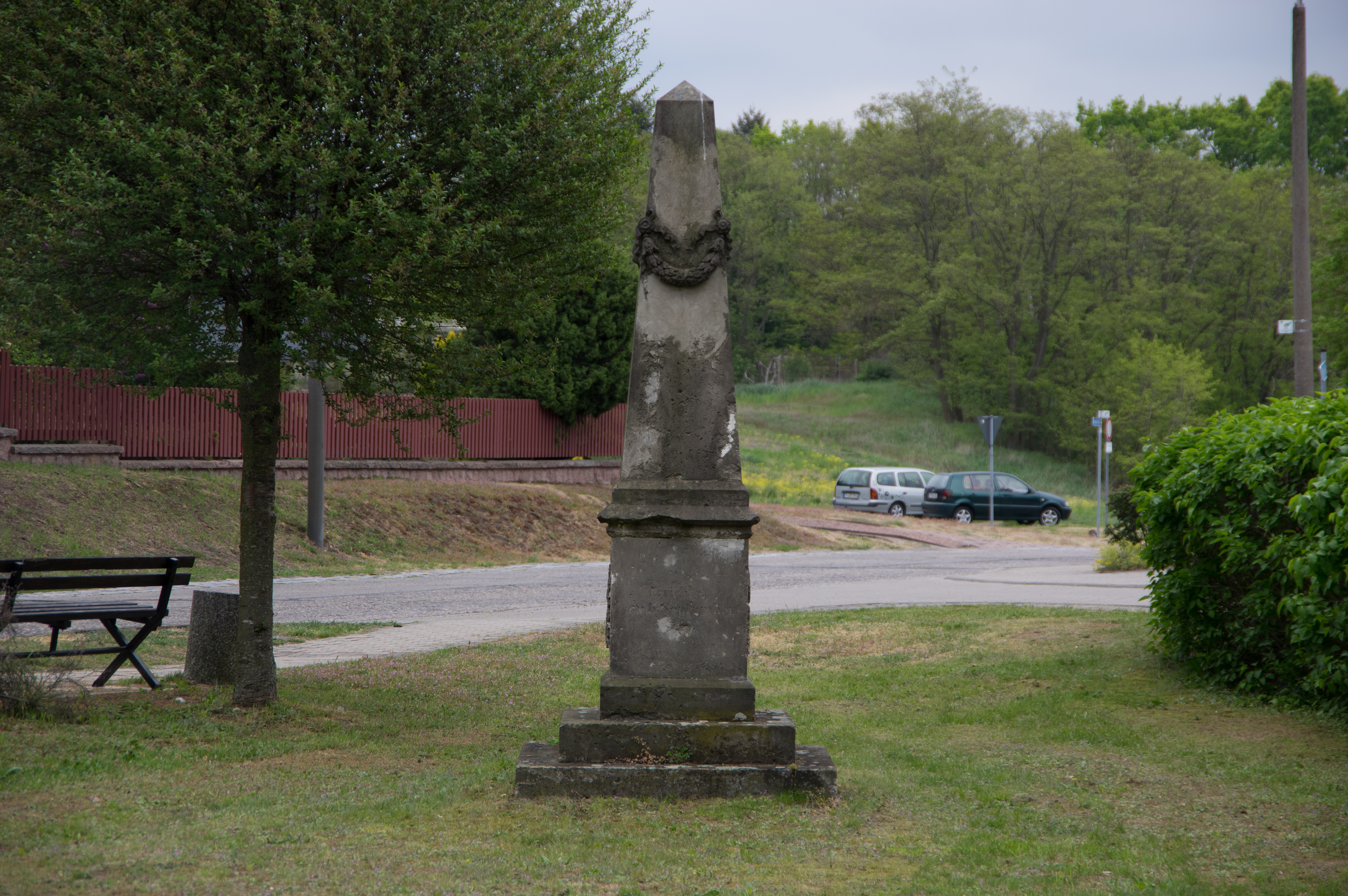 Jüterbog in Brandenburg. Der Friedhof wurde nach 1870/1871 angelegt. Er lagen gestorbene französische Kriegsgefangene, die gestorben waren.Der Friedhof steht unter Denkmalschutz.